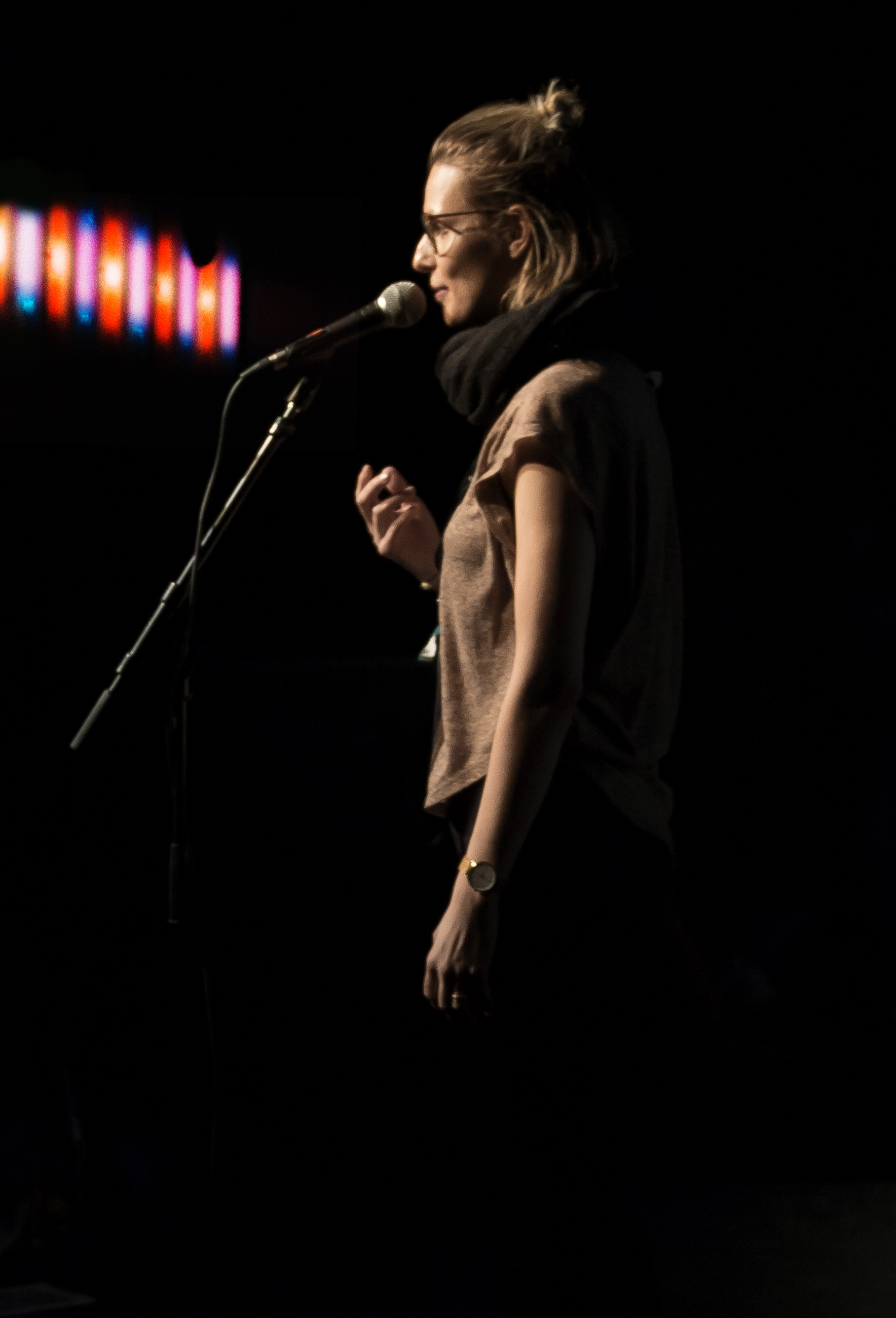 Pauline Füg bei den bayerischen Meisterschaften im Poetry Slam 2016. Foto: Lolo Logie Photography